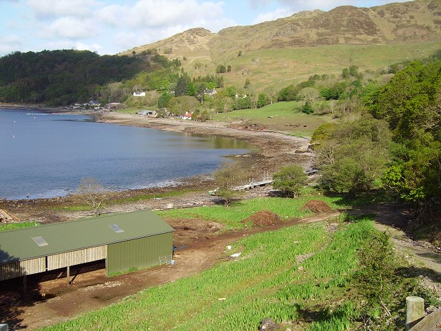 Laga Bay